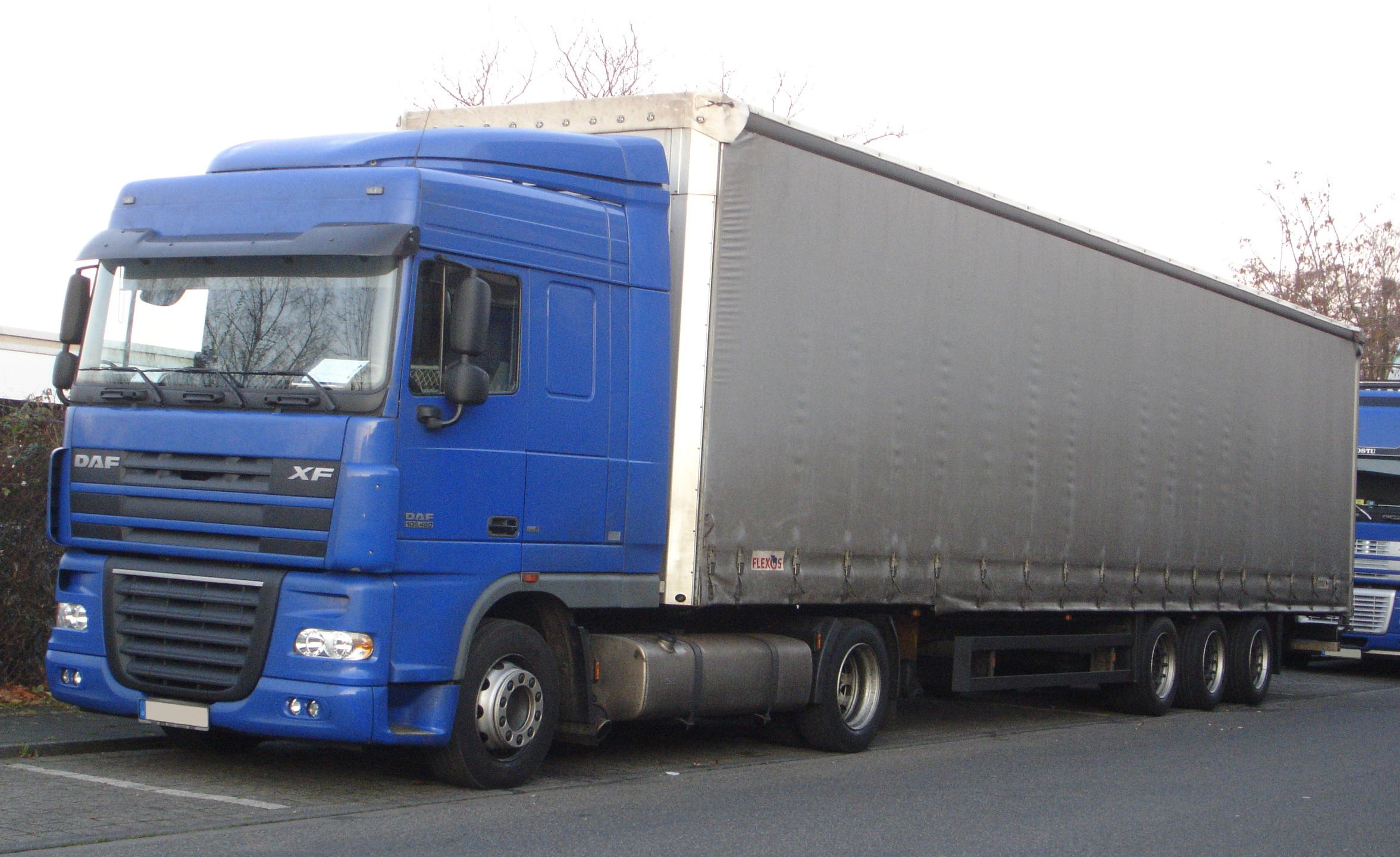 DAF XF105 Gardinenplanensattelzug